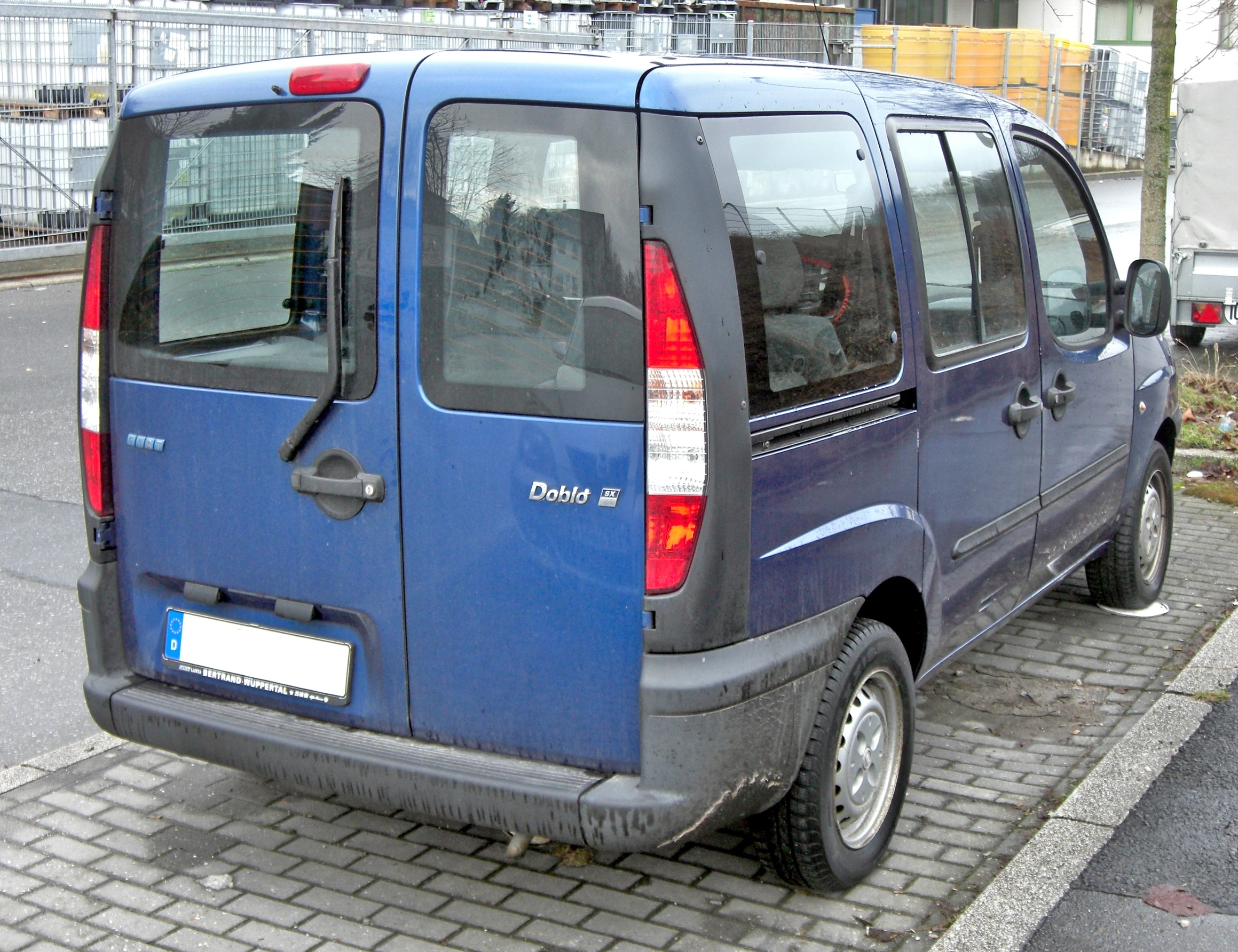 Fiat Doblo